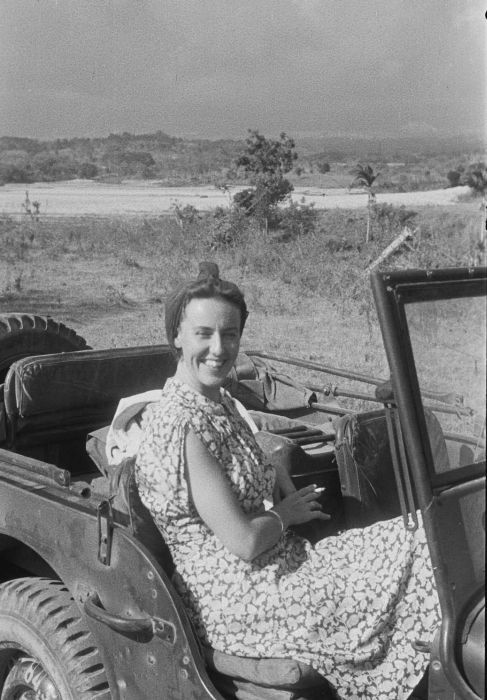 negatief. Gefotografeerd tijdens een reis van Makassar (Ujung Pandang) naar Tjikoro (Cikoro) en terug, van 25 tot en met 27 september 1948.. Vrouw in een jeep van het leger, Celebes